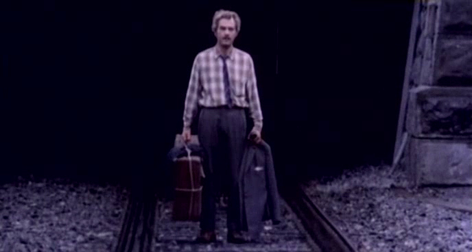 Screenshot del film Pane e cioccolata (1973) diretto da Franco Brusati